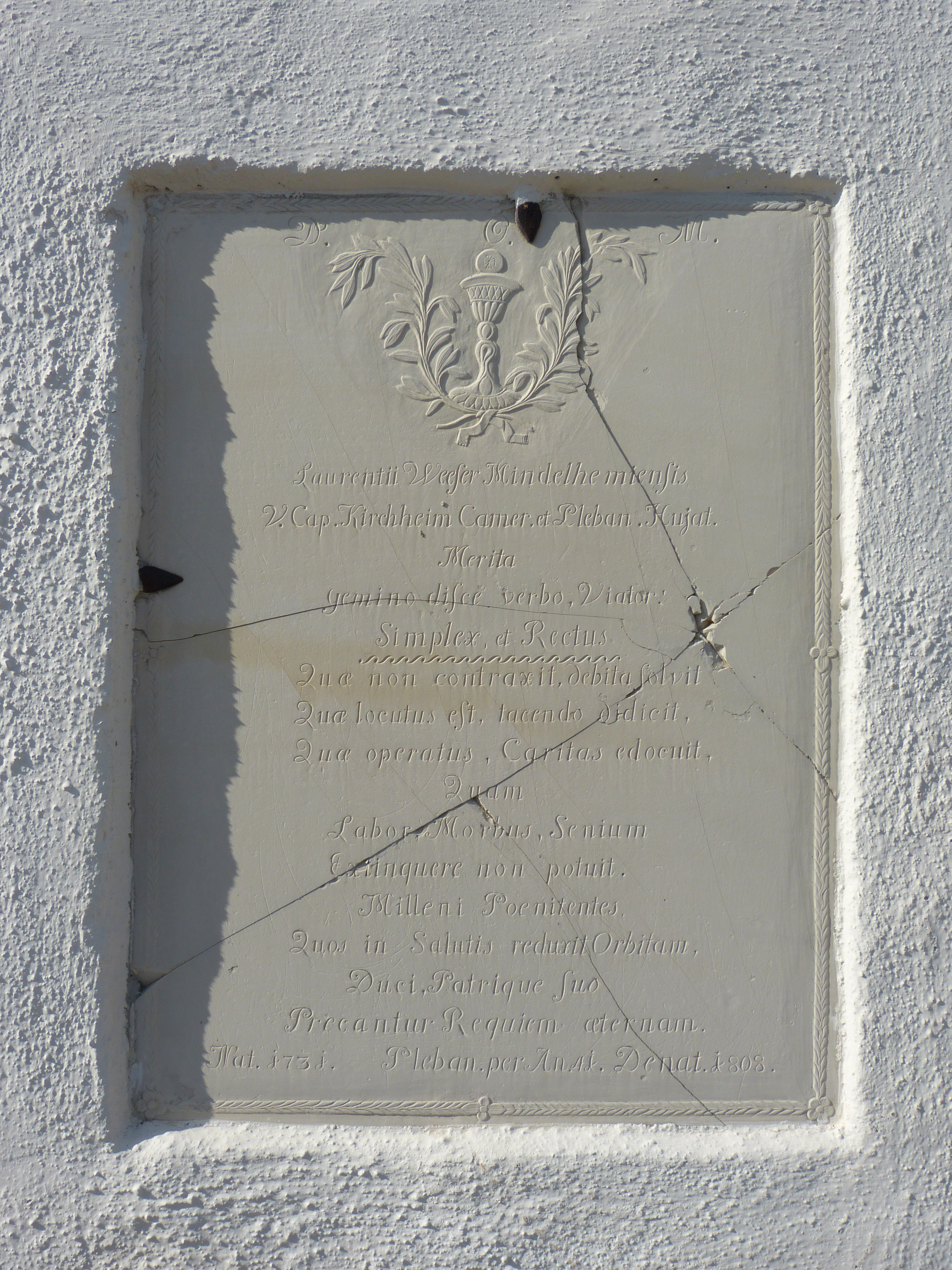 Grabdenkmal von Pfarrer Laurentius Weber († 1808); St. Johannes Baptista im Ortsteil Könghausen, Eppishausen, Landkreis Unterallgäu, Bayern